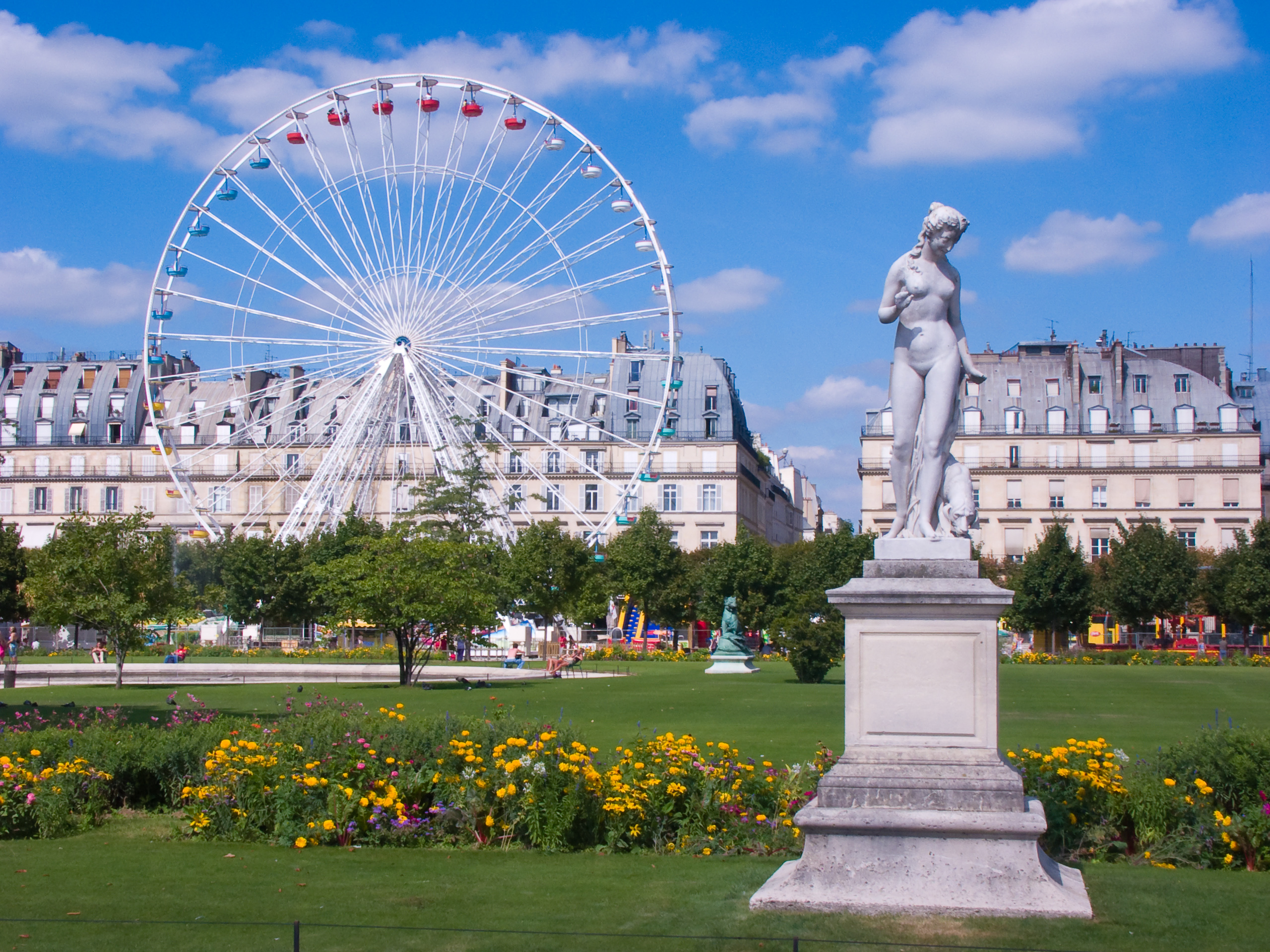 Grande roue dans jardin des Tuileries avec autres jeux divers